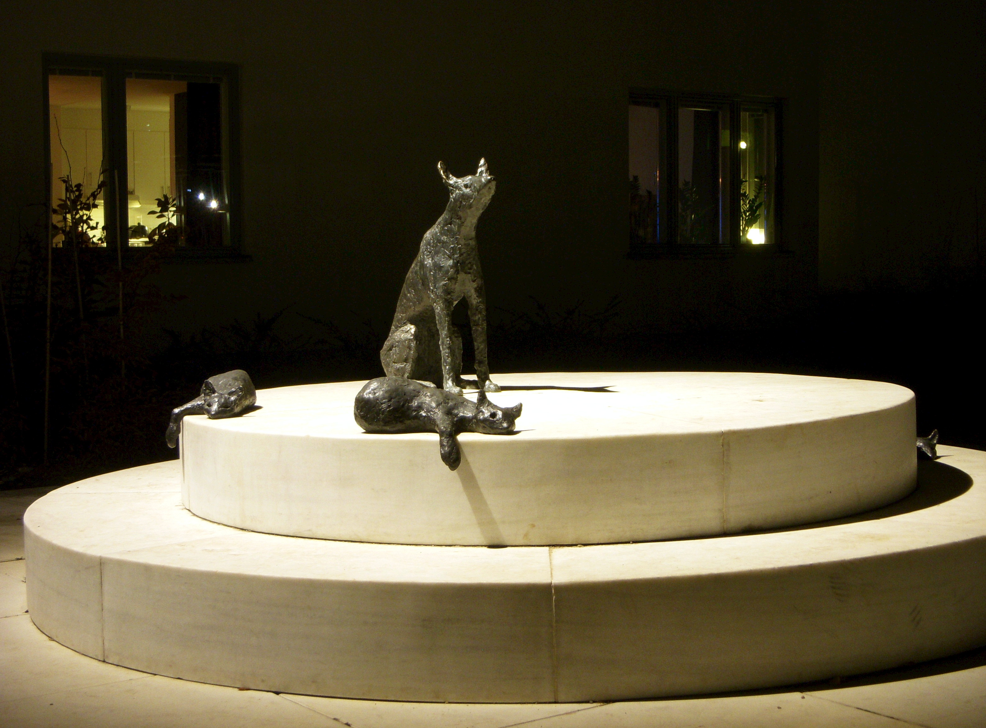 I väntan på någon, skulptur i brons och marmor av Måna Grivner (1946–), rest 2009 vid Förskeppsgatan 5 i Södra Hammarbyhamnen i Stockholm